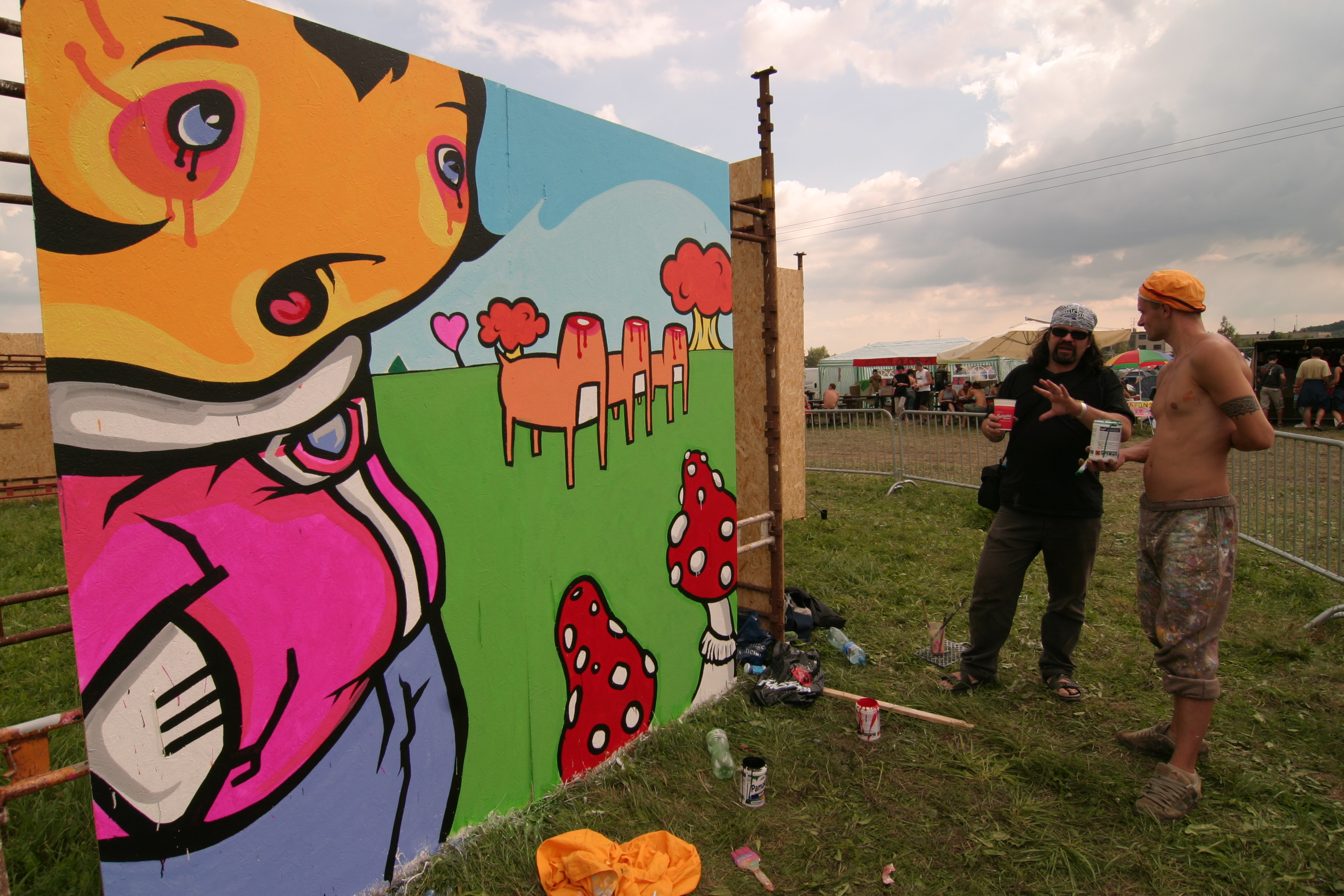 Live painting Hodokvas 2004 - Erik Šille